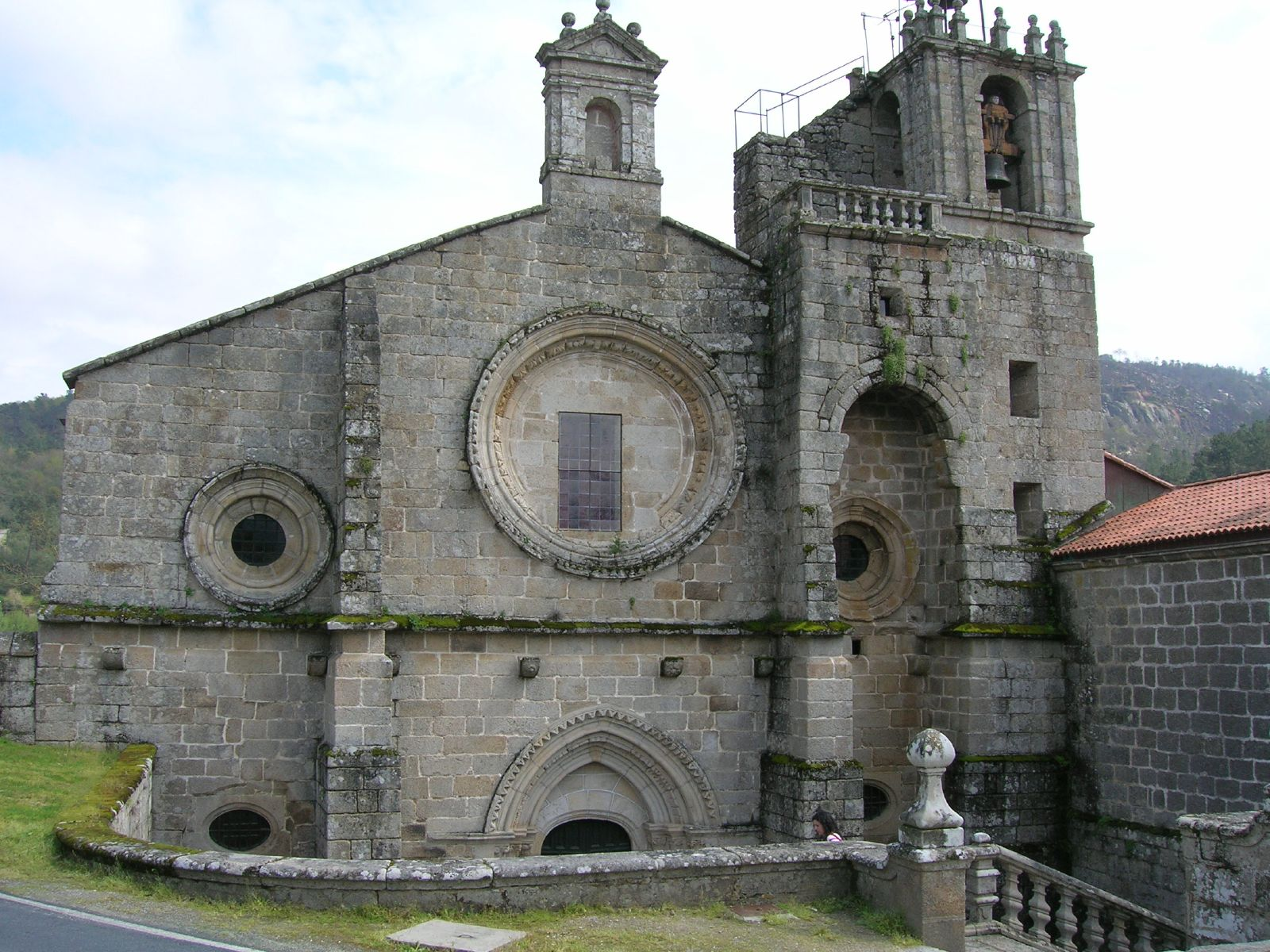 Mosteiro de San Clodio de Leiro, Galiza'Mosteiro de San Clodio de Leiro'